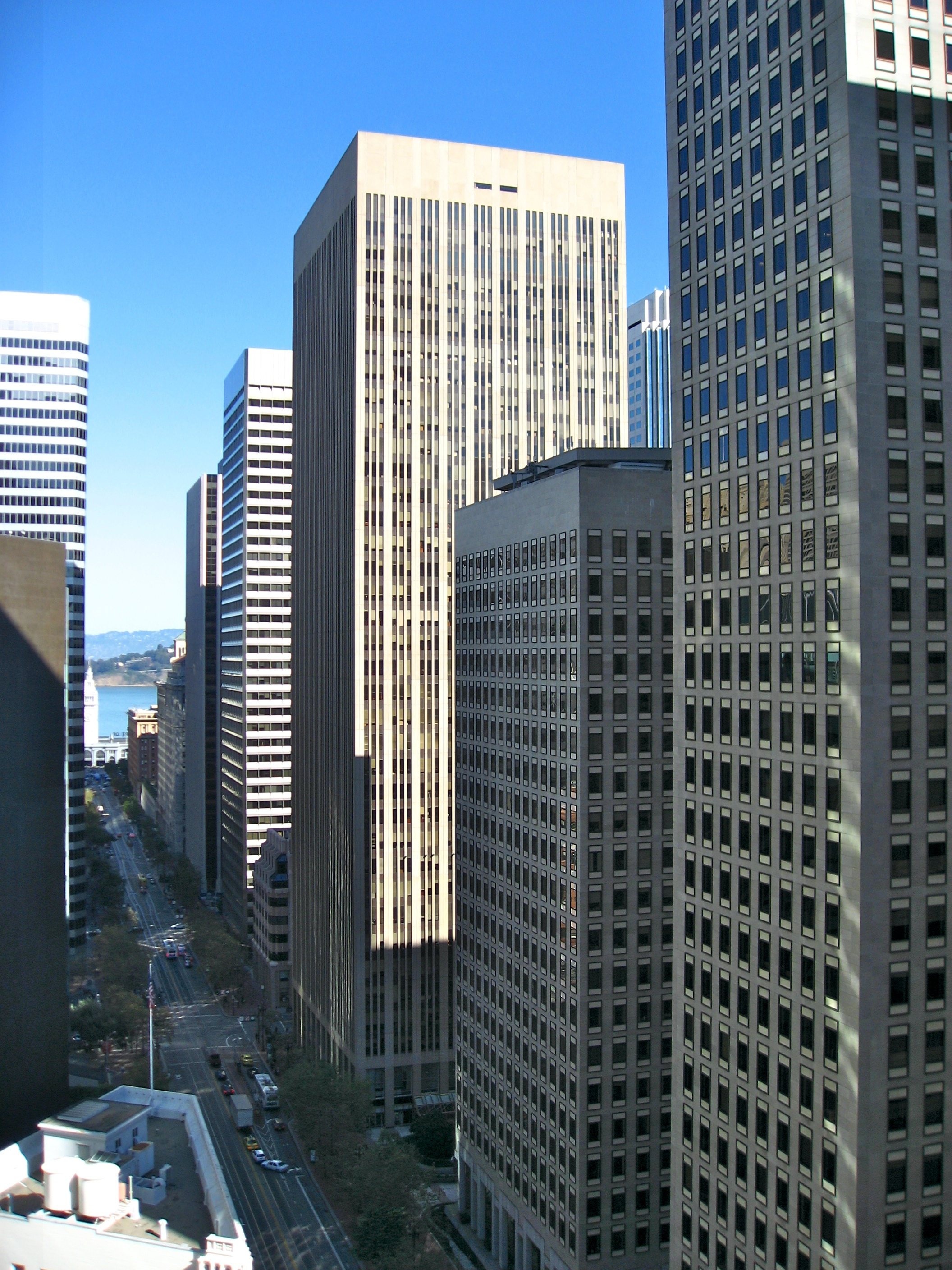 San Francisco Financial District